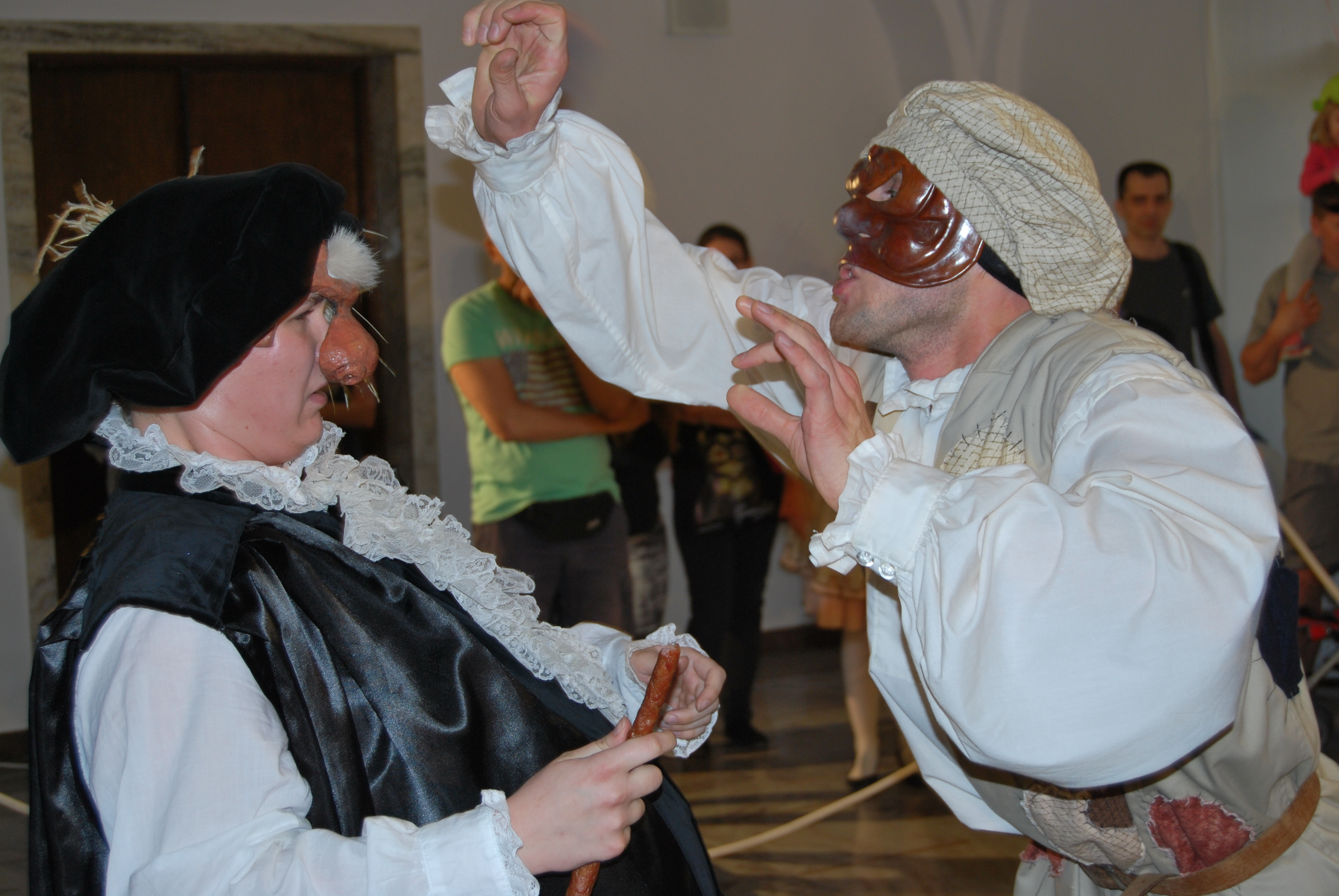 Fragment spektaklu komedii dell'arte w Państwowym Muzeum Etnograficznym w Warszawie.